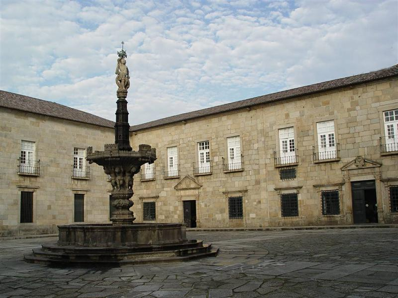 Foto do Largo do Paço em Braga, Portugal.